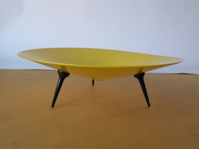 Plastová miska v bruselském stylu